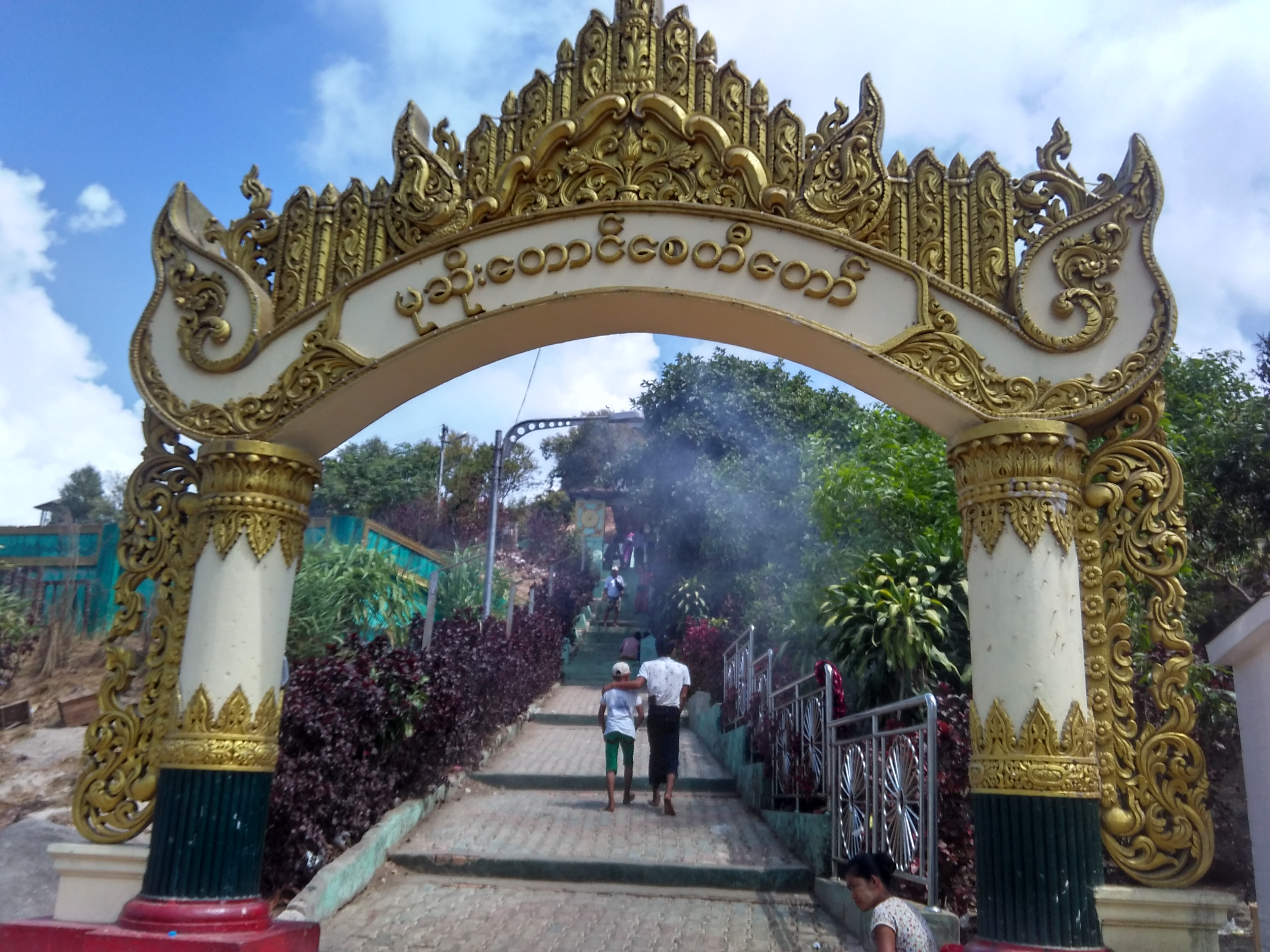 မြန်မာဘာသာ: မုဆိုးတောင်စေတီတော်၊ ကျိုက်ထီးရိုးသာသနာ့နယ်မြ၊ မွန်ပြည်နယ်။